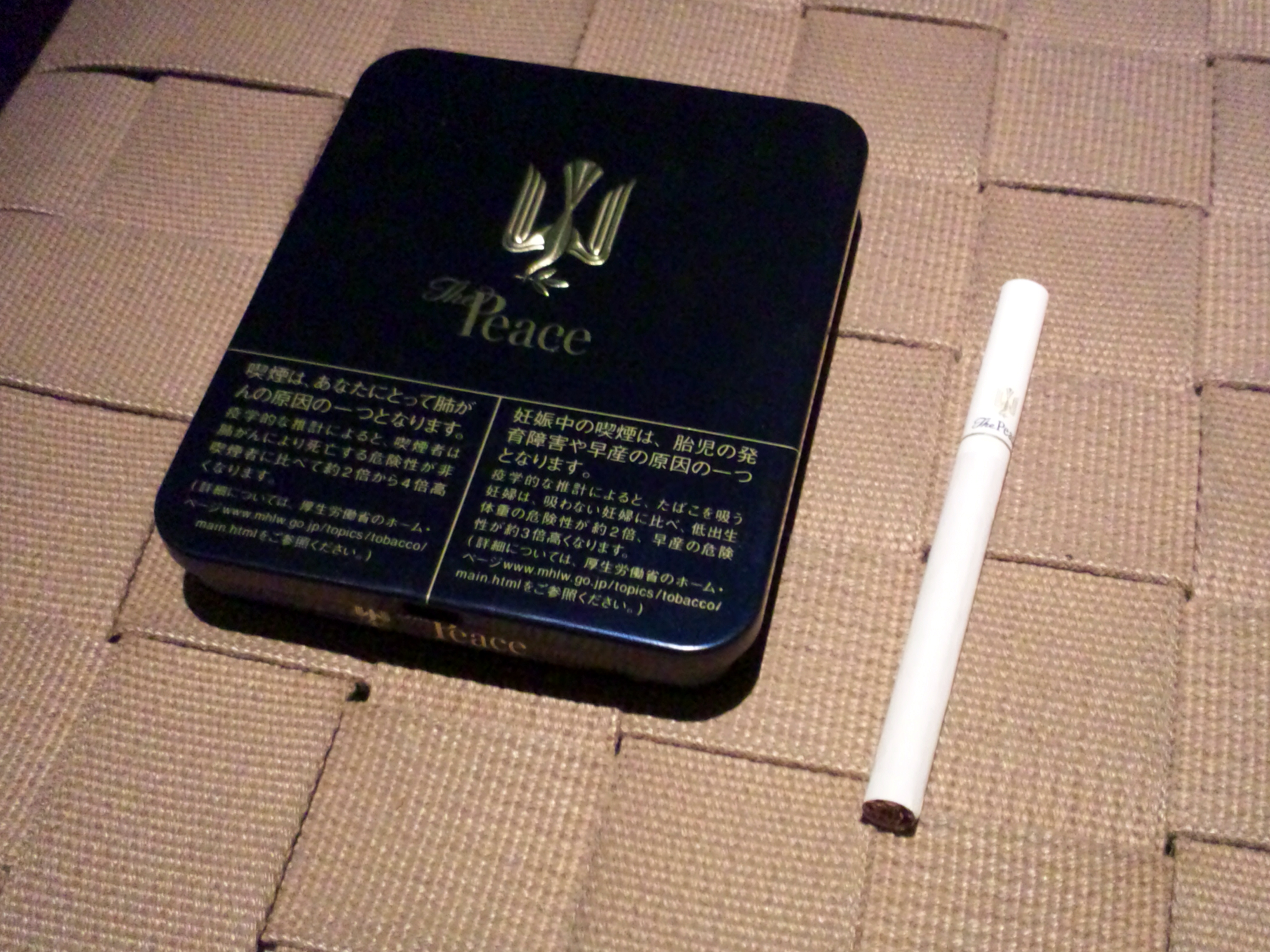 ザ・ピースの缶とザ・ピース1本